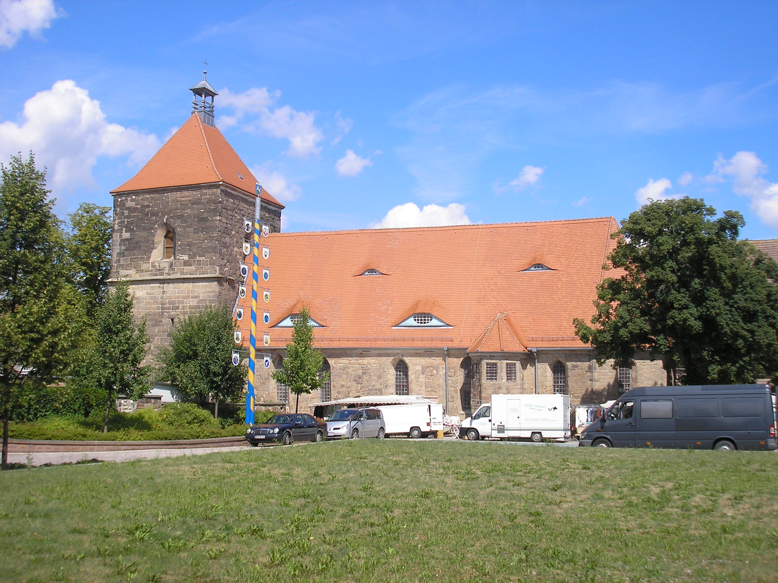 Die Stadtkirche von Nebra (Sachsen-Anhalt).